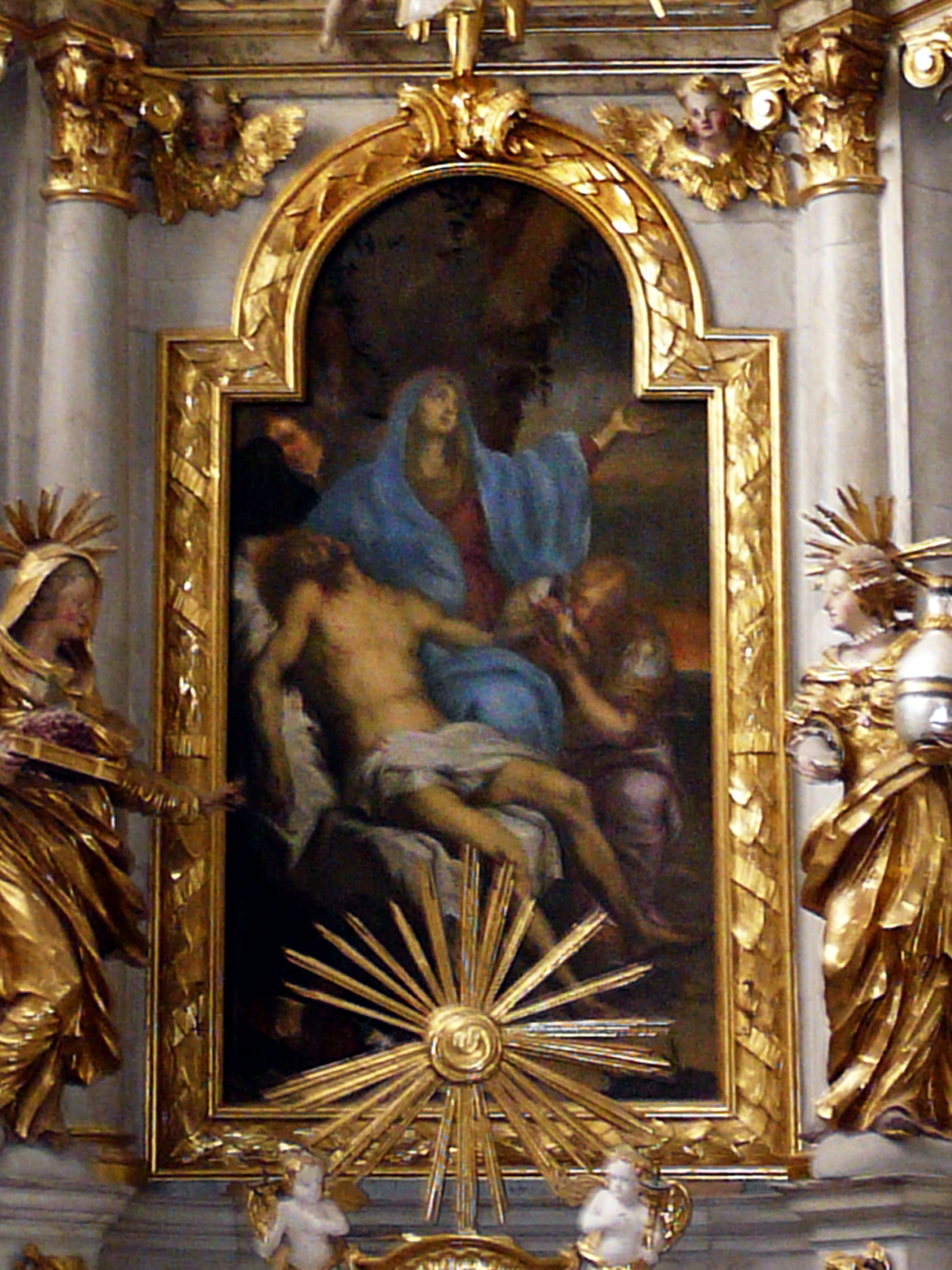 Фрагмент алтаря скорбящей Богородицы